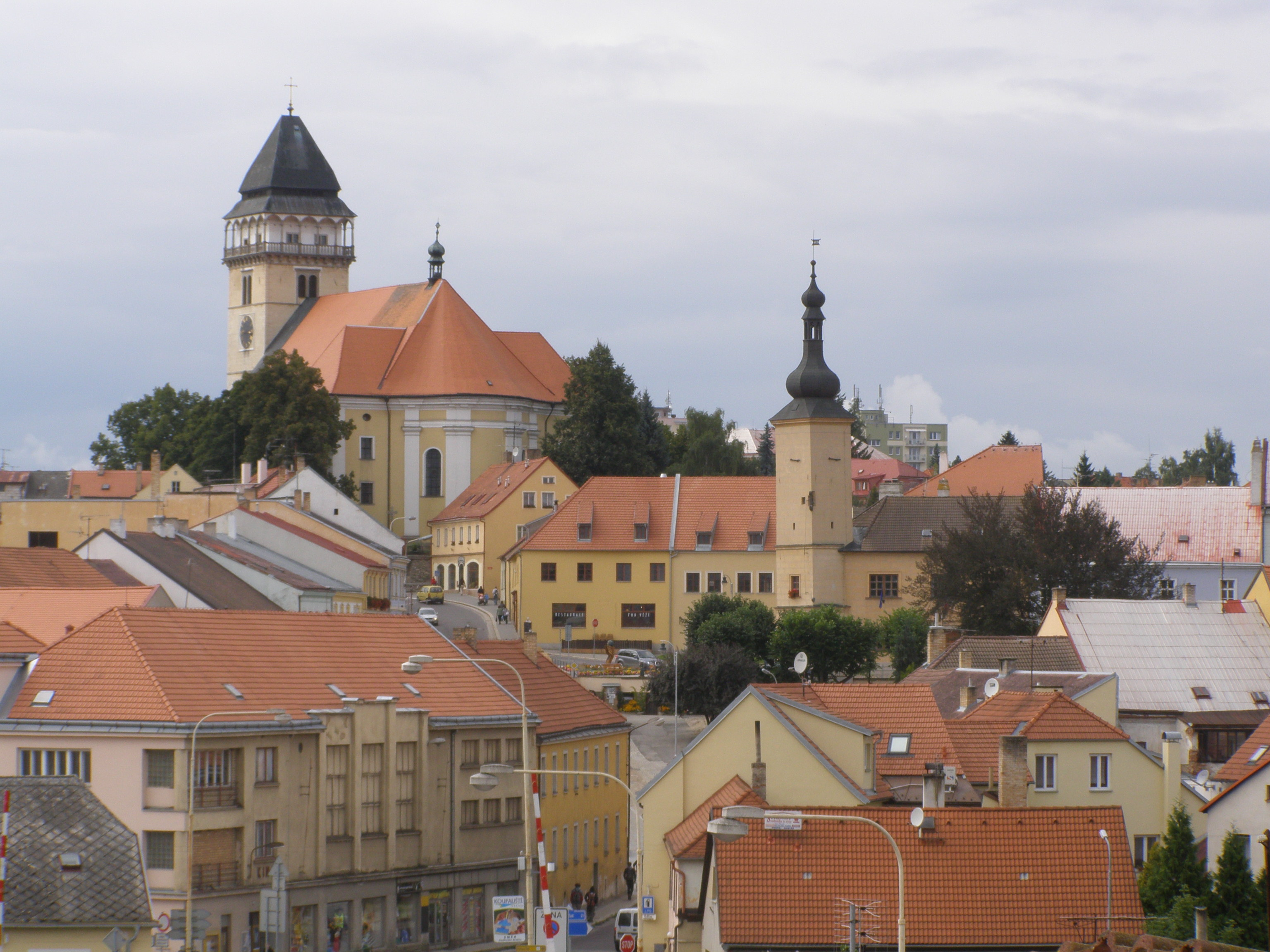 Dačice, pohled od kláštera karmelitek na centrum města, vlevo nahoře Kostel svatého Vavřince, uprostřed radnice a Palackého náměstí